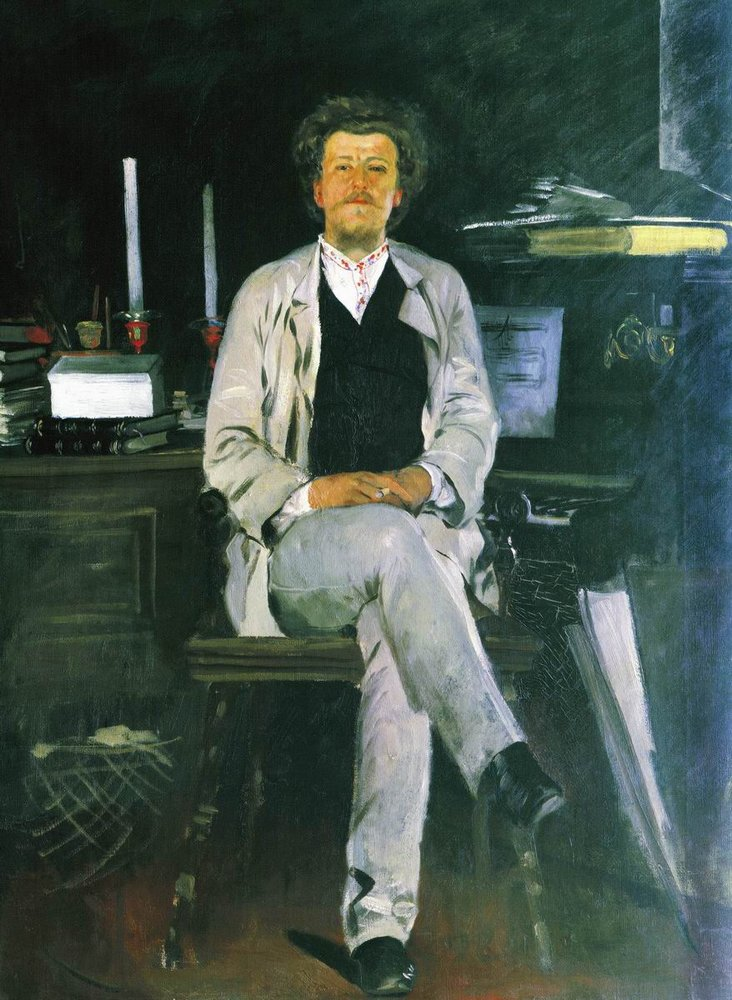 Портрет И.Ф.Тюменева. 1886-1888. Холст, масло. Таганрогская картинная галерея, Таганрог